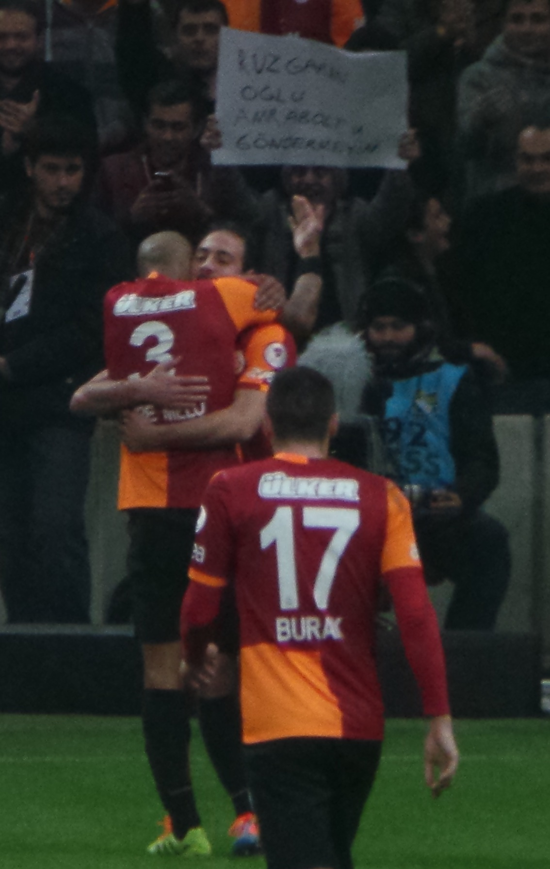 Amrabat'ın Tokatspor gol sonrası sevinci